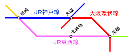 JR東西線に係わる特例の説明図